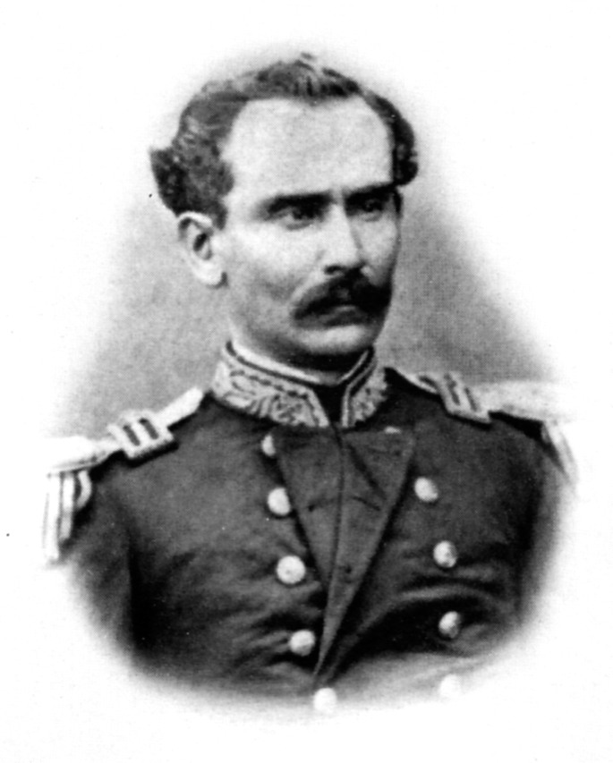 Nicolás del Portal (?-1892), marino peruano que fue comandante de la corbeta "Unión" durante la Guerra del Pacífico.